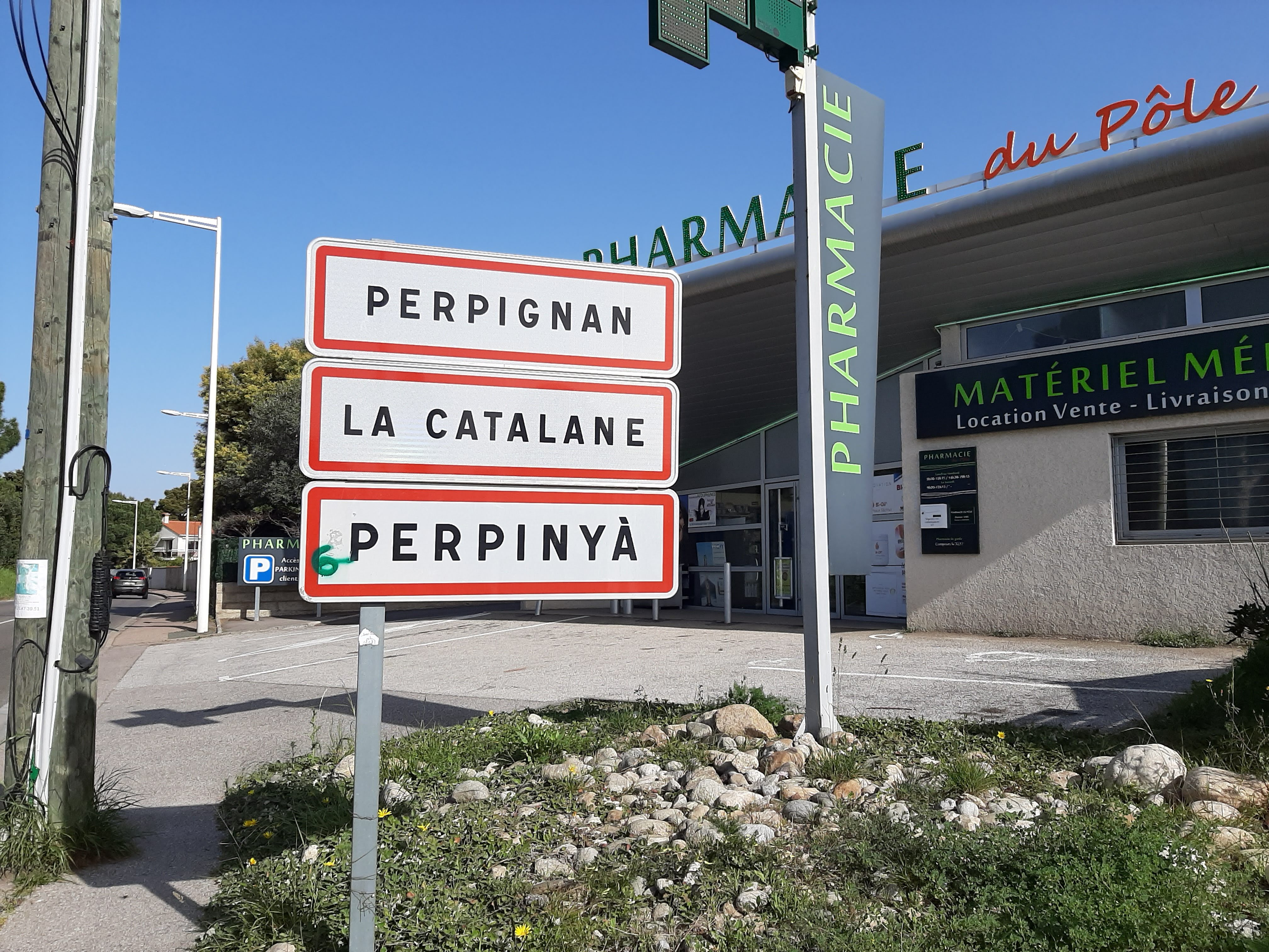 Rètol a l'entrada de Perpinyà amb el nom del municipi.